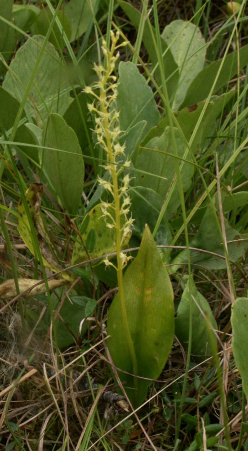 Malaxis monophyllos Niedermoor, Litauen